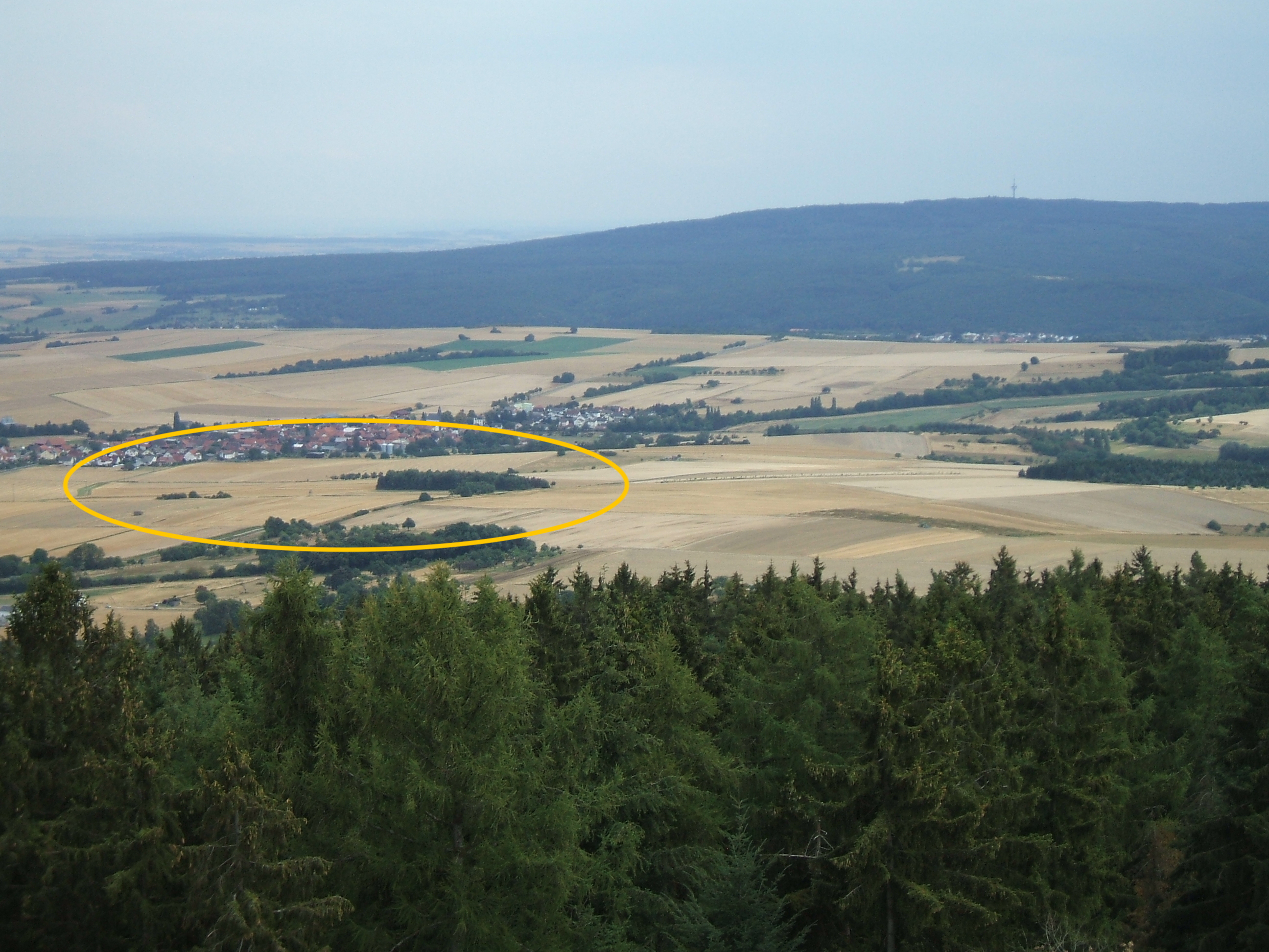 Blick vom Aussichtsturm auf dem Hausberg auf Fauerbach v.d.H. und die Landschaft nördlich (davor), in der die beiden Äste des Riedgrabens liegen, hervorgehoben durch das ockerfarbene Oval. Etwa in der Mitte des Bildes verläuft die K 15 von links, Hoch-Weisel, nach rechts, Münster. Im Hintergrund rechts ist der Steinkopf mit seinem Fernmeldeturm.